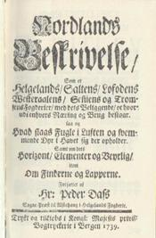 Nordlands Beskrivelse